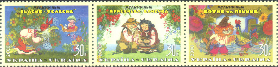 Поштові марки з серії "українські мультфільми", 2000 рік